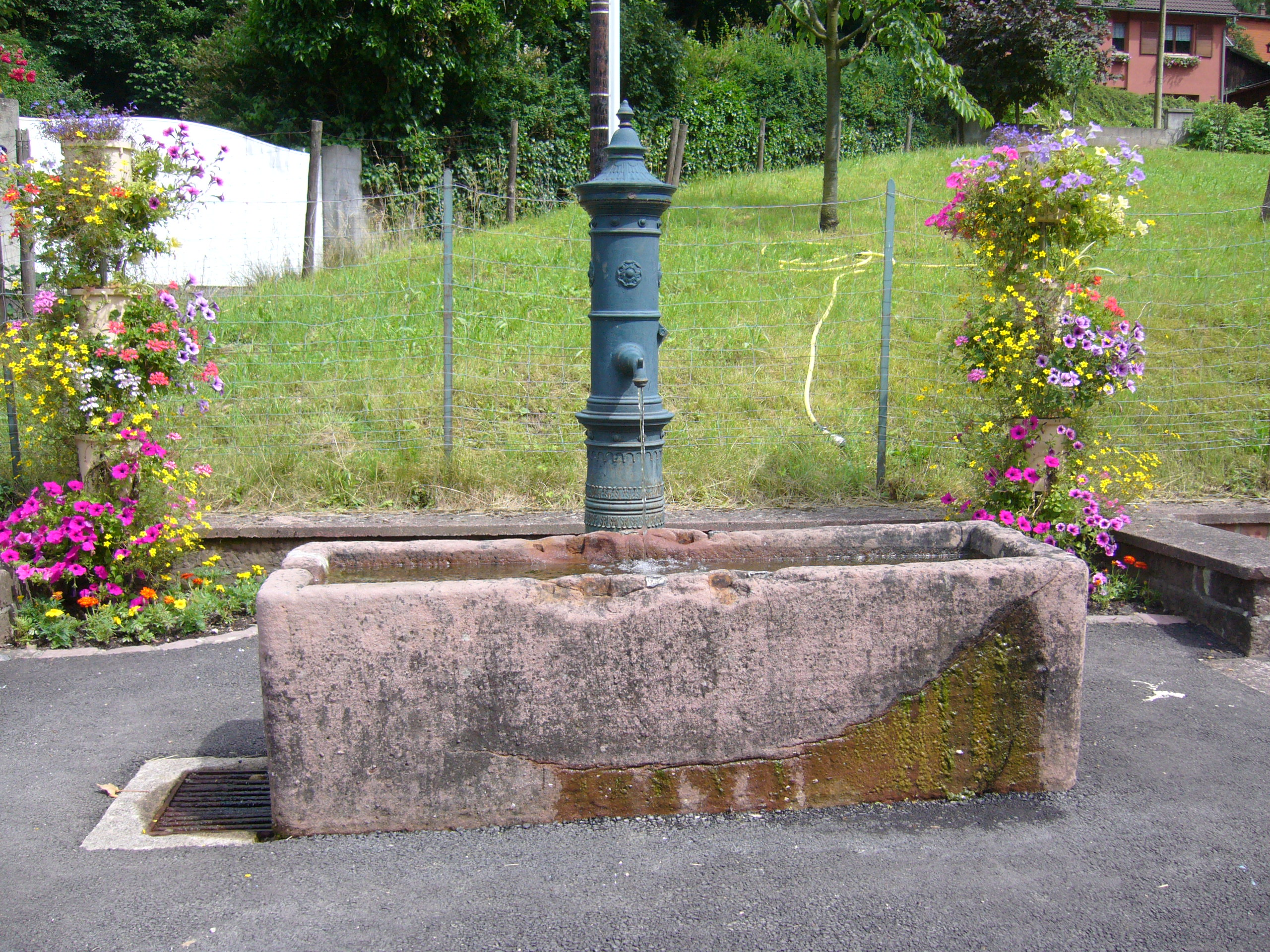 Vieille fontaine à Fertrupt.